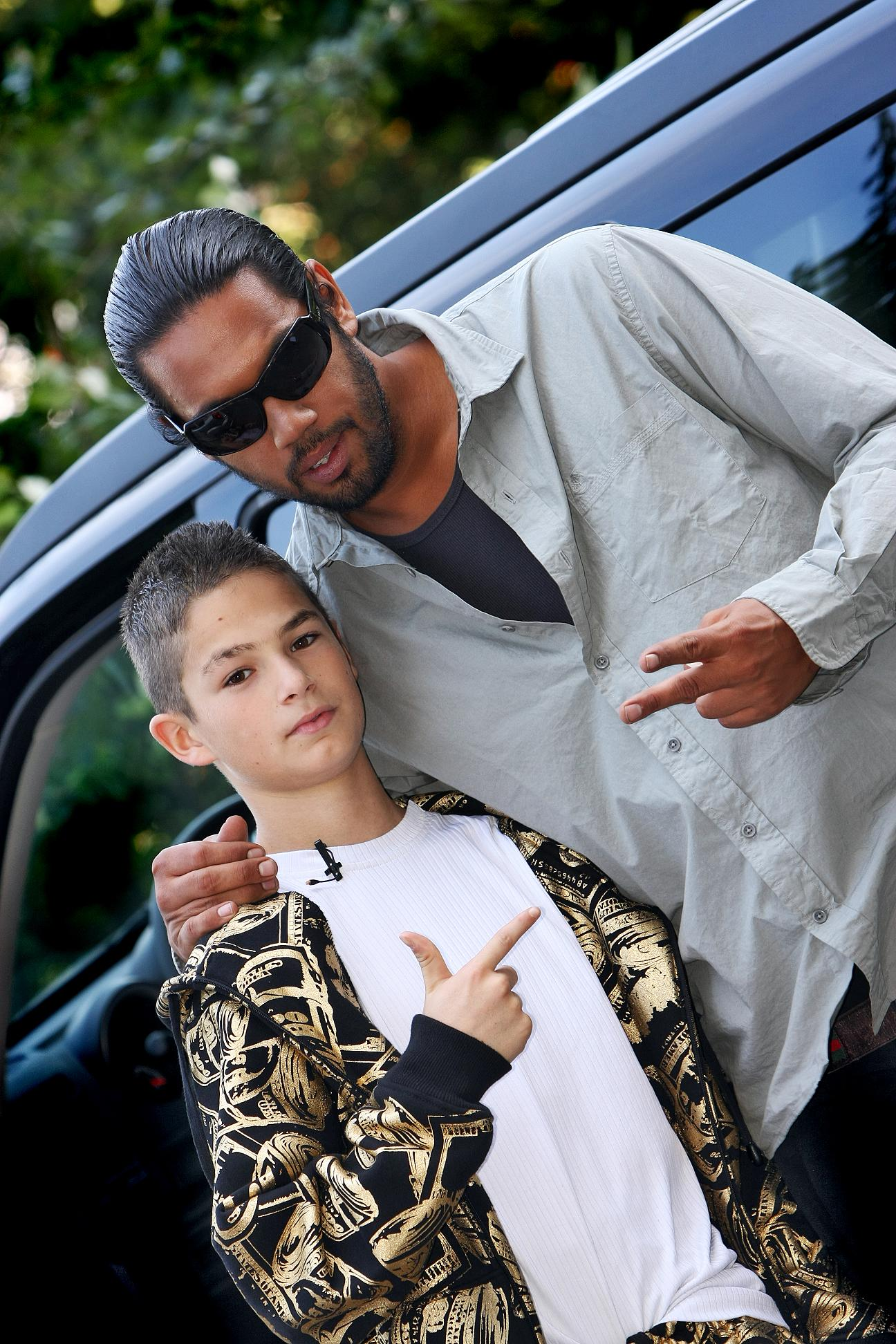 Samy Deluxe als Musikpate bei Dein Song (Songwriting-Wettbewerb für Kinder beim Fernsehsender KI.KA) mit Musikkomponist Samer